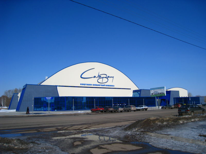 Спортивно-концертный комплекс Салават